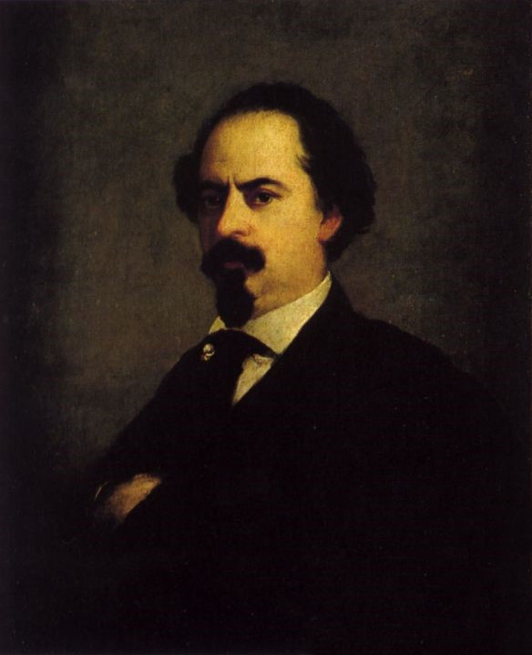 óleo sobre lienzo